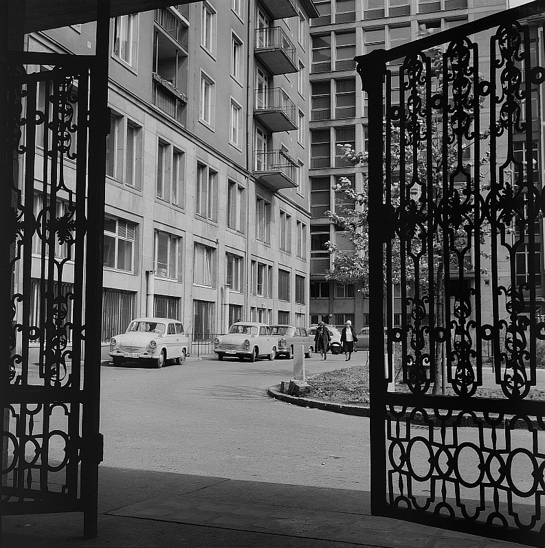 Original image description from the Deutsche Fotothek Dresden. Innenhof an der Gewandhausstraße